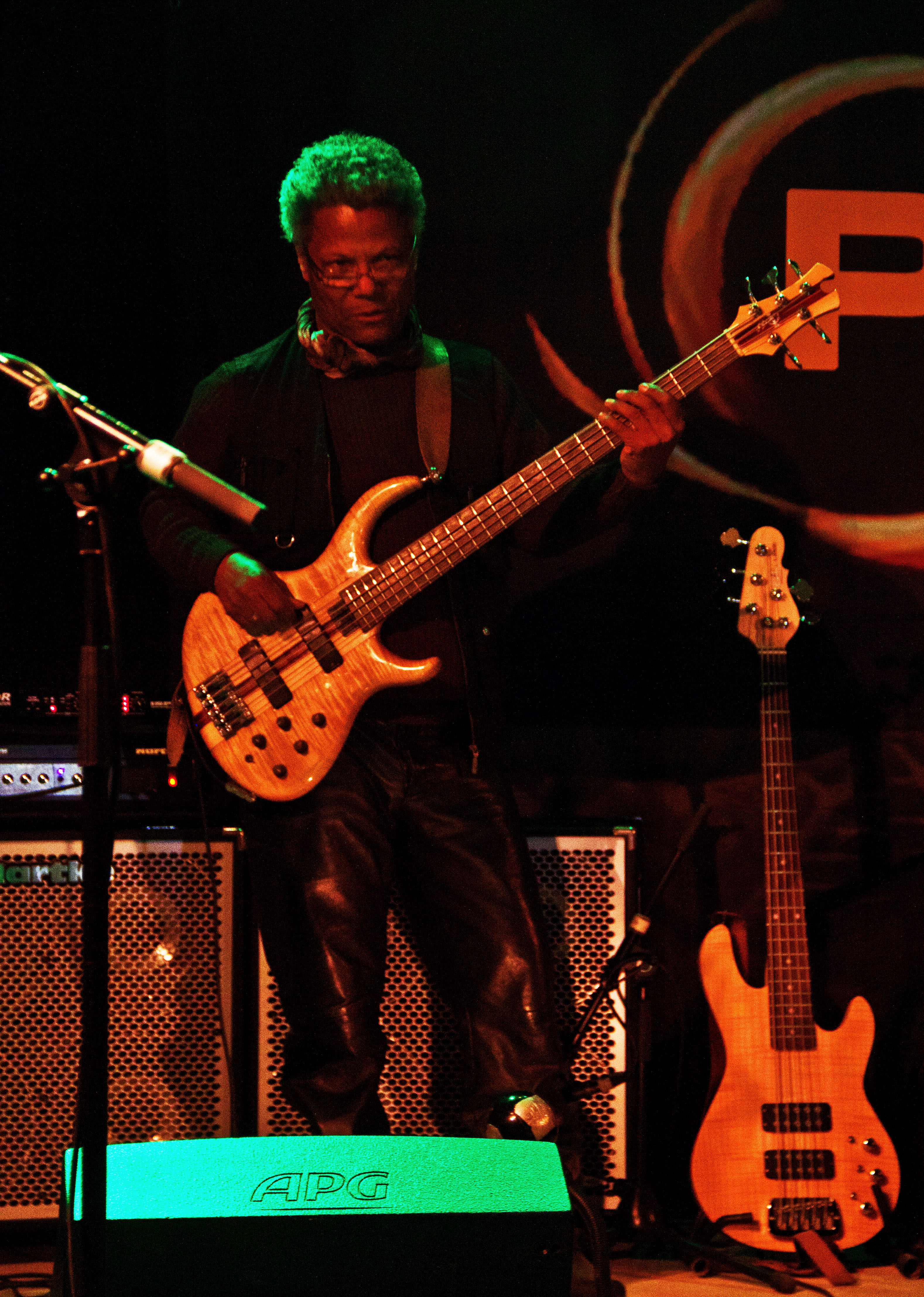 Le bassiste Hilaire Rama accompagnant Pat O'May le 4 mai 2013 au Festy'jeanne à Plouégat-Moysan.